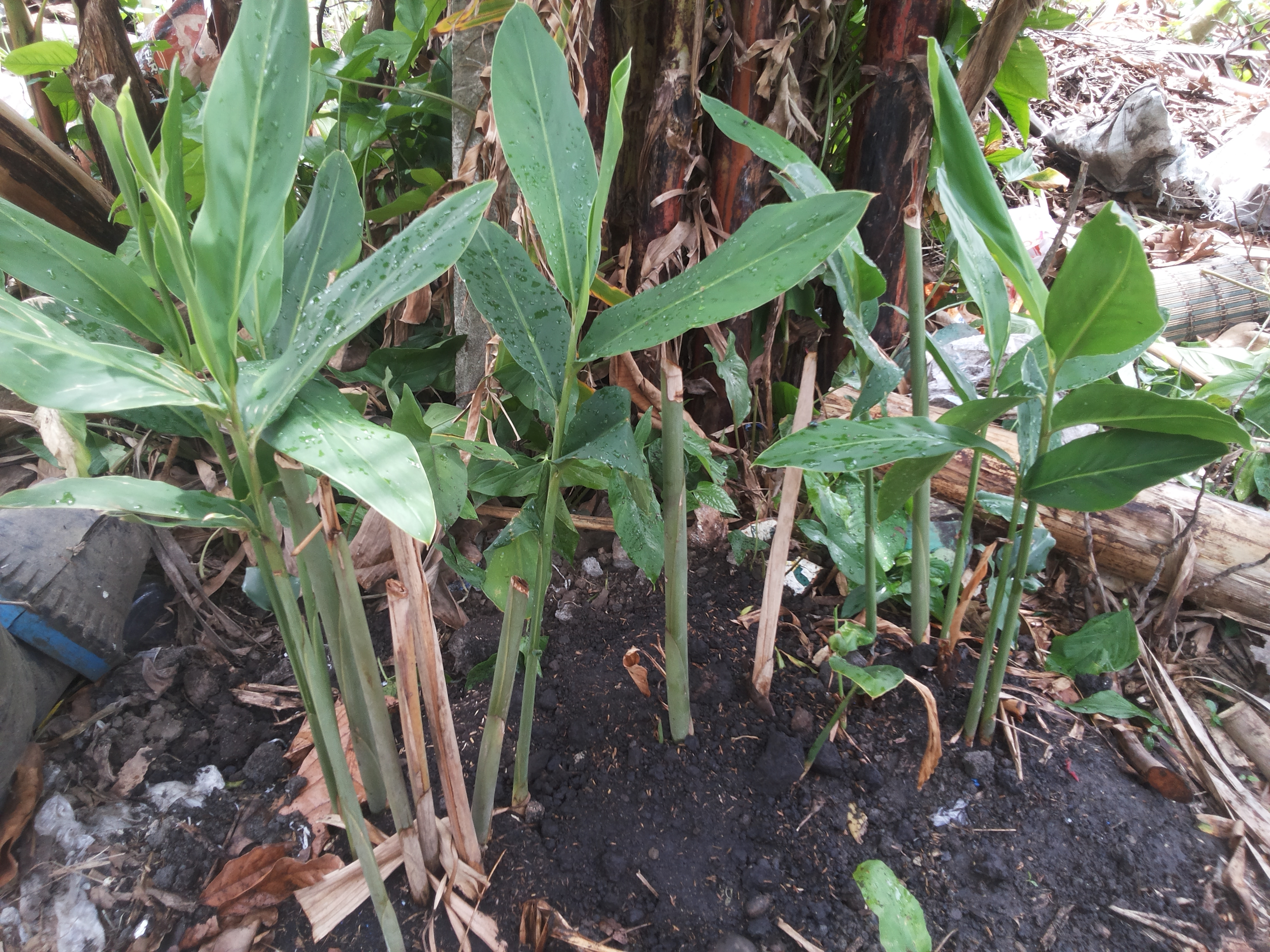 Bikol Central: Tinanom na langkawas